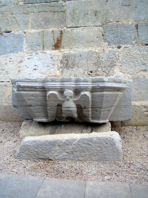 Capitel del Castillo de la Concepción de Cartagena